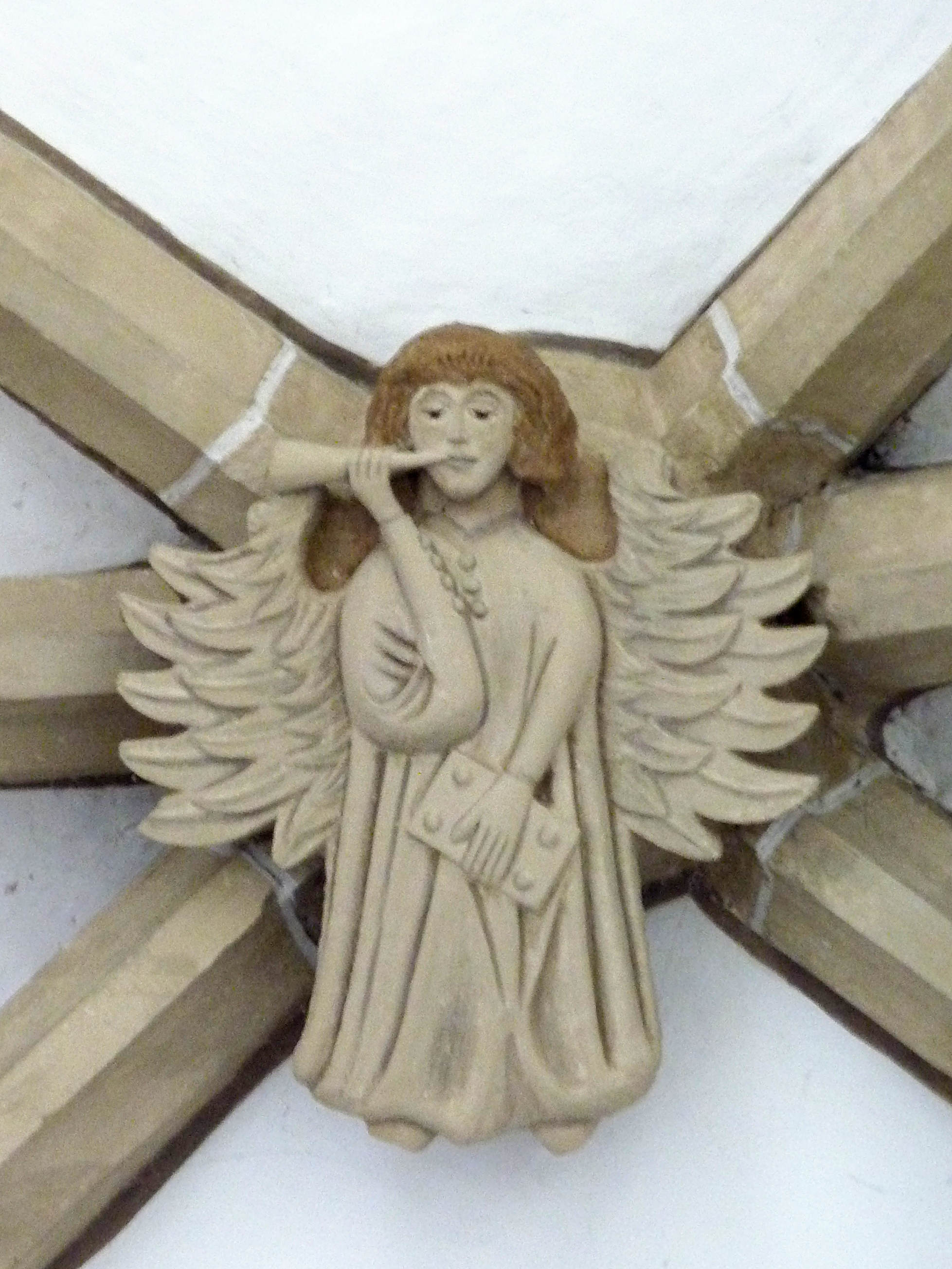 Evangelische Kirche in Mühlbach (Eppingen), Schlusstein im Chor mit „Engel des Jüngsten Gerichts“